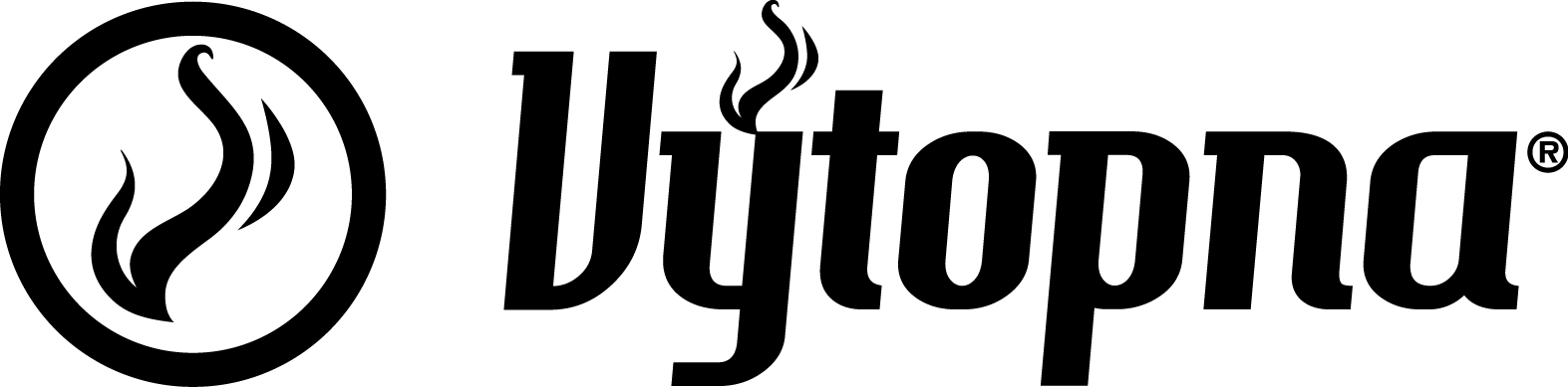 logo vytopna